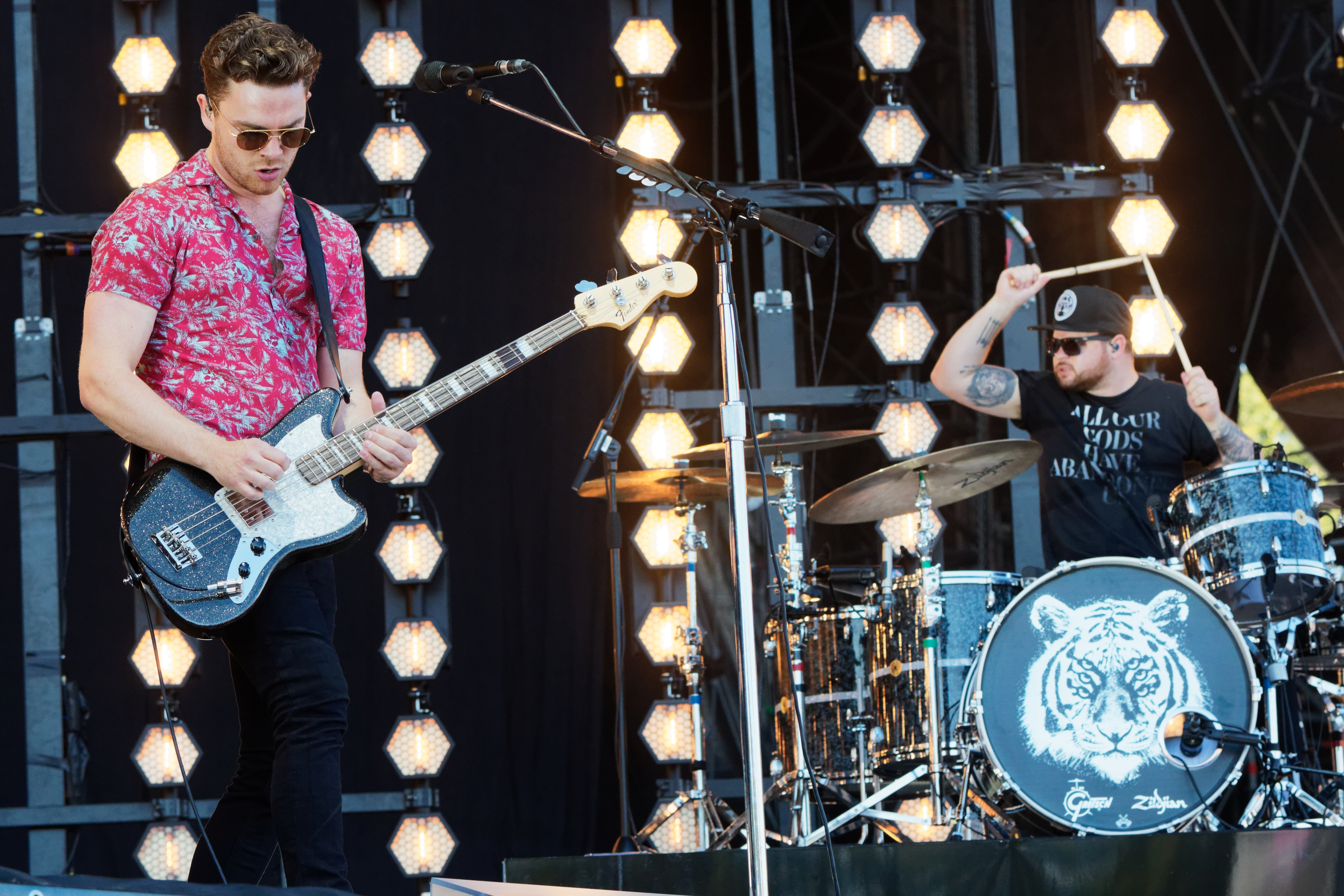 Royal Blood en concert lors du festival des vieilles charrues 2017.